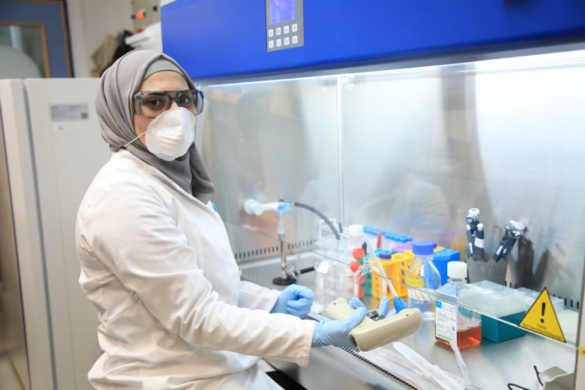 مركز النجاح لأبحاث السرطان والخلايا الجذعية أسيل صوافطة